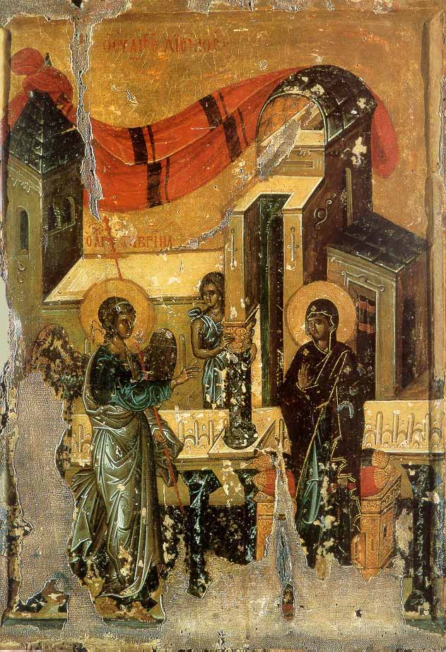 Byzantine icon of the Annunciation Благовещение. Неизвестный мастер, Византия, XIV век. Вторая четверть - середина XIV века. дерево (слева утрачена, ковчег), паволока, темпера, позолота. ГМИИ. 55х43 см. Ж-2860. Атрибуция и датировка О. Е. Этингоф; В. Н. Лазарев связывал с Константинополем и относил к первой четверти XIV века; Е. Я. Осташенко — к началу столетия. Архимандритом Павлом (Прусским) привезена из Иерусалима; с 1887 в Никольском монастыре, Москва; с 1917 в ГИМ; с 1933 в ГМИИ.